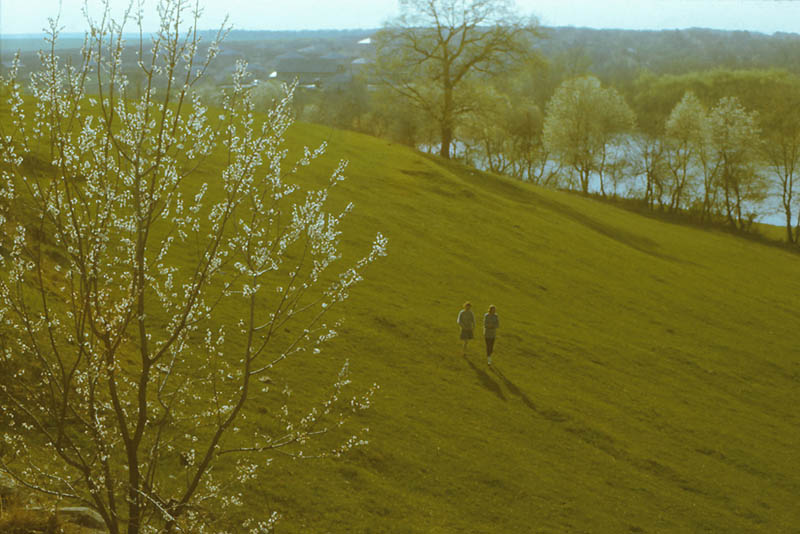 Ocnita District.